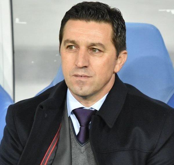 Беснік Хасі - футбольний тренер Андерлехта